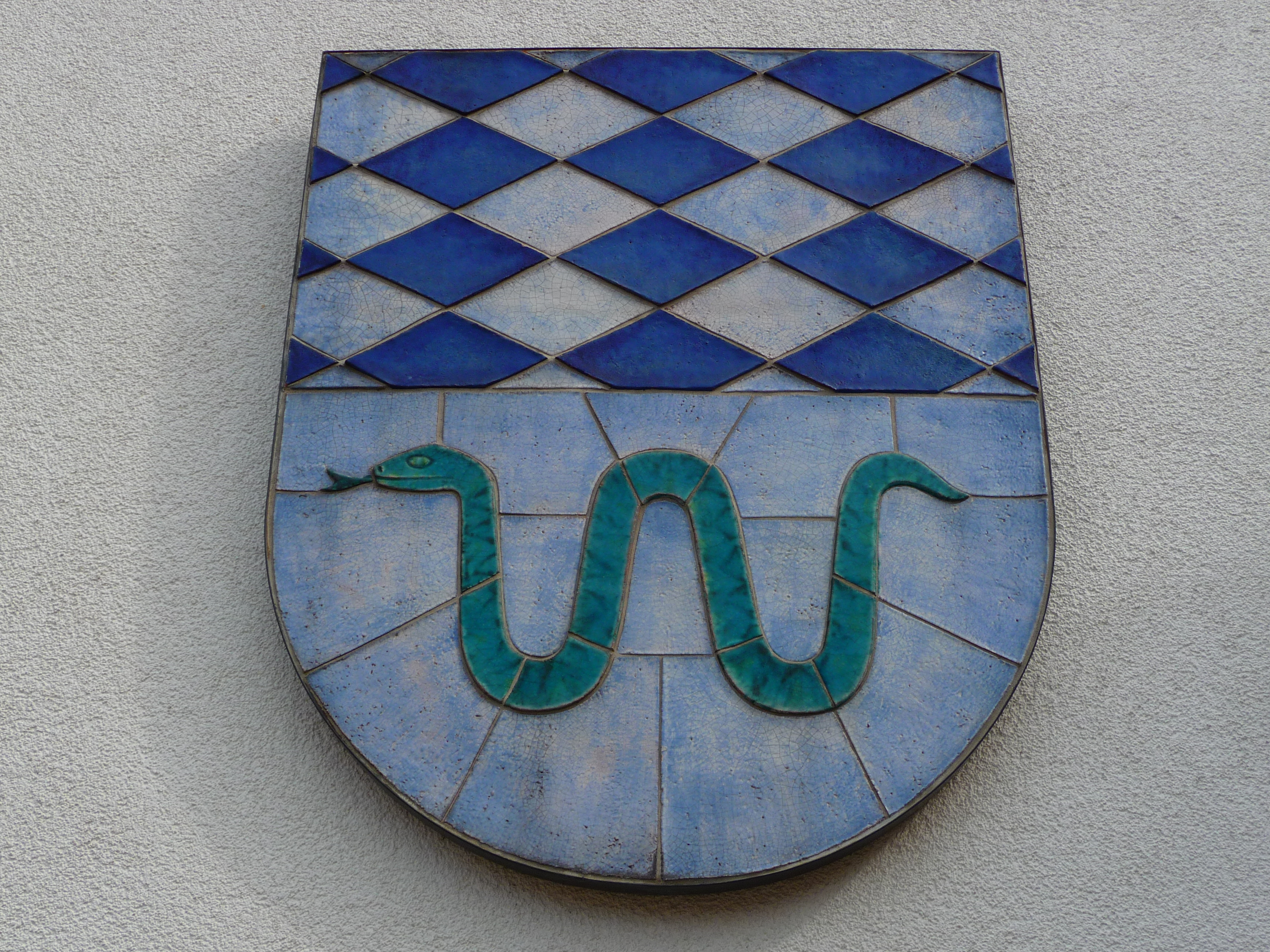 Wappen der Gemeinde Oftersheim (Rhein-Neckar-Kreis, Deutschland), angebracht am Rathaus im Ortskern